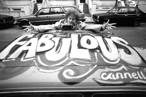 Malcolm Mclaren next to Fabulous's car